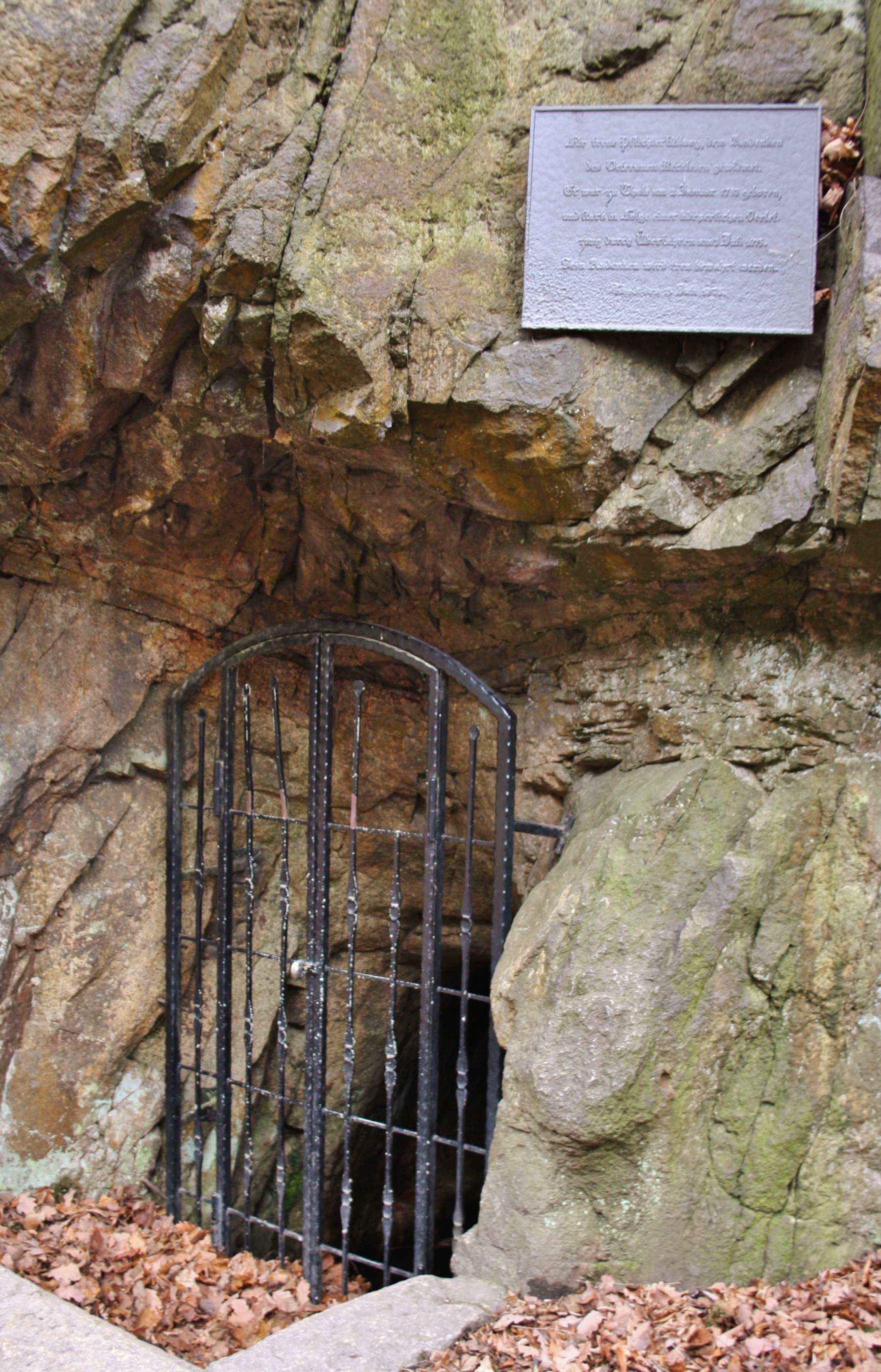 Der verschlossene Eingang der Schallhöhle im Bodetal bei Thale